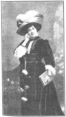 Retrato de Concepción Gimeno de Flaquer, en la revista argentina Caras y Caretas.